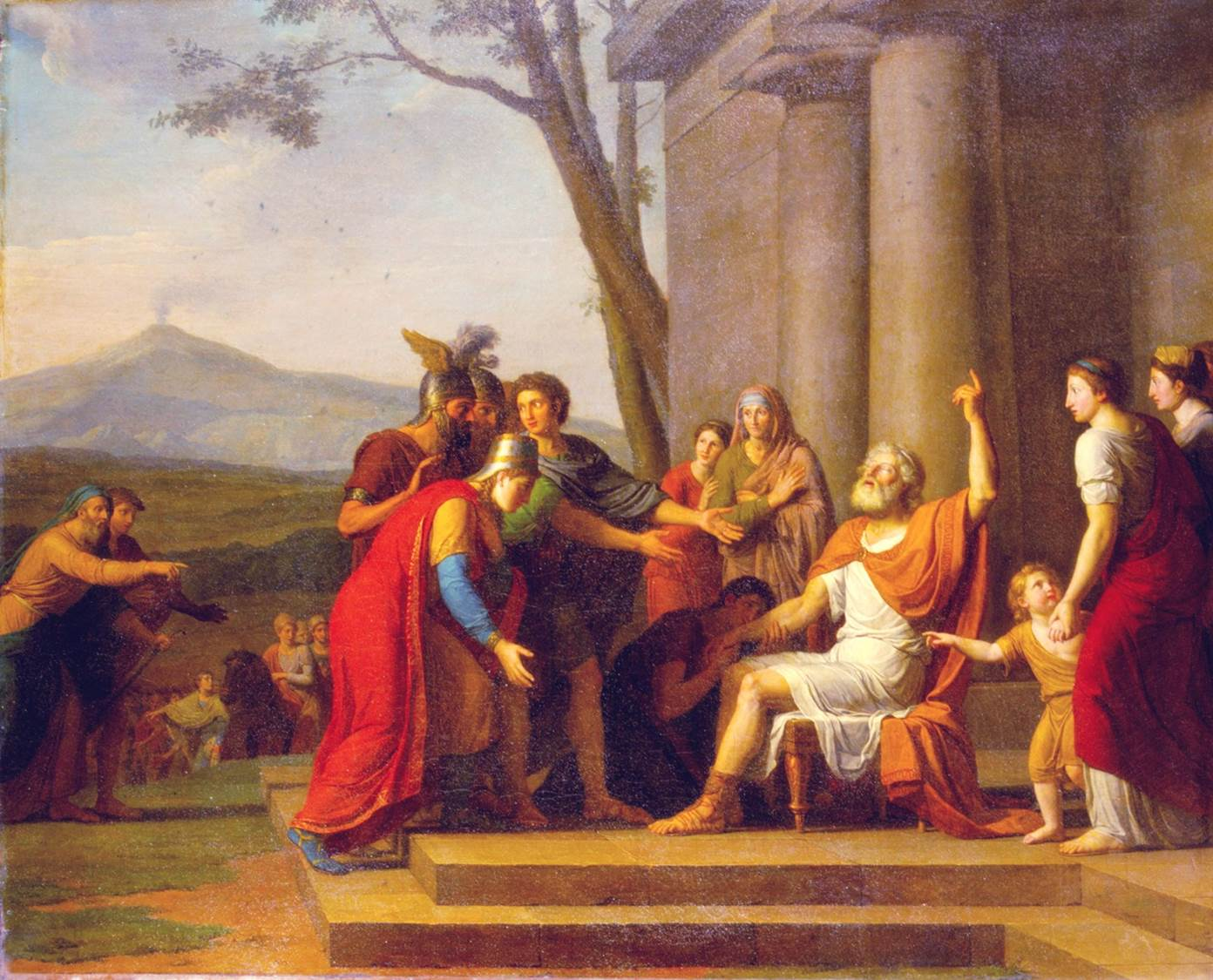 Timoléon à qui les Syracusiens amènent des étrangers. Versione con una maggiore risoluzione e colore.